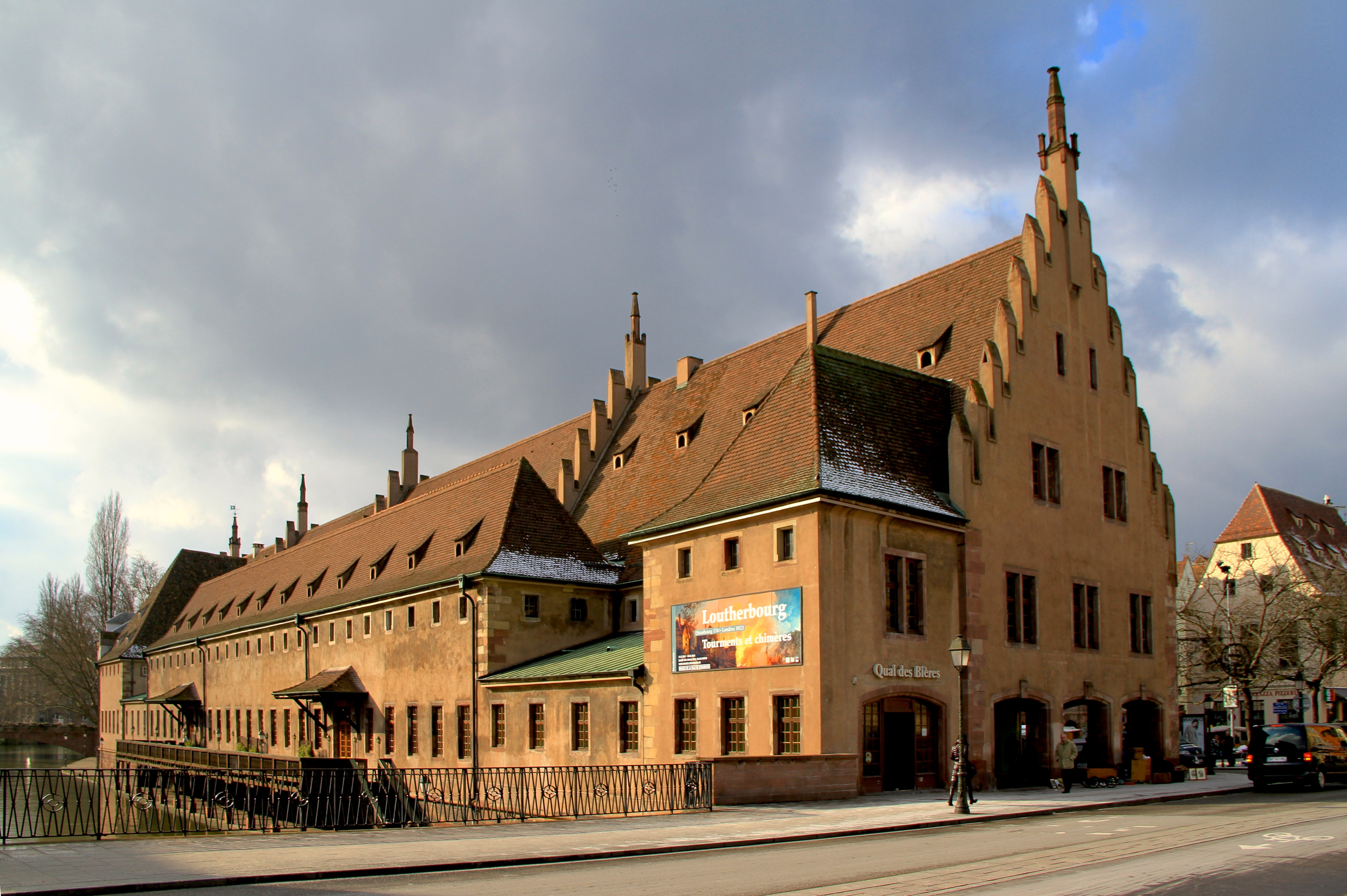 Strasbourg l'Ancienne Douane en 2013